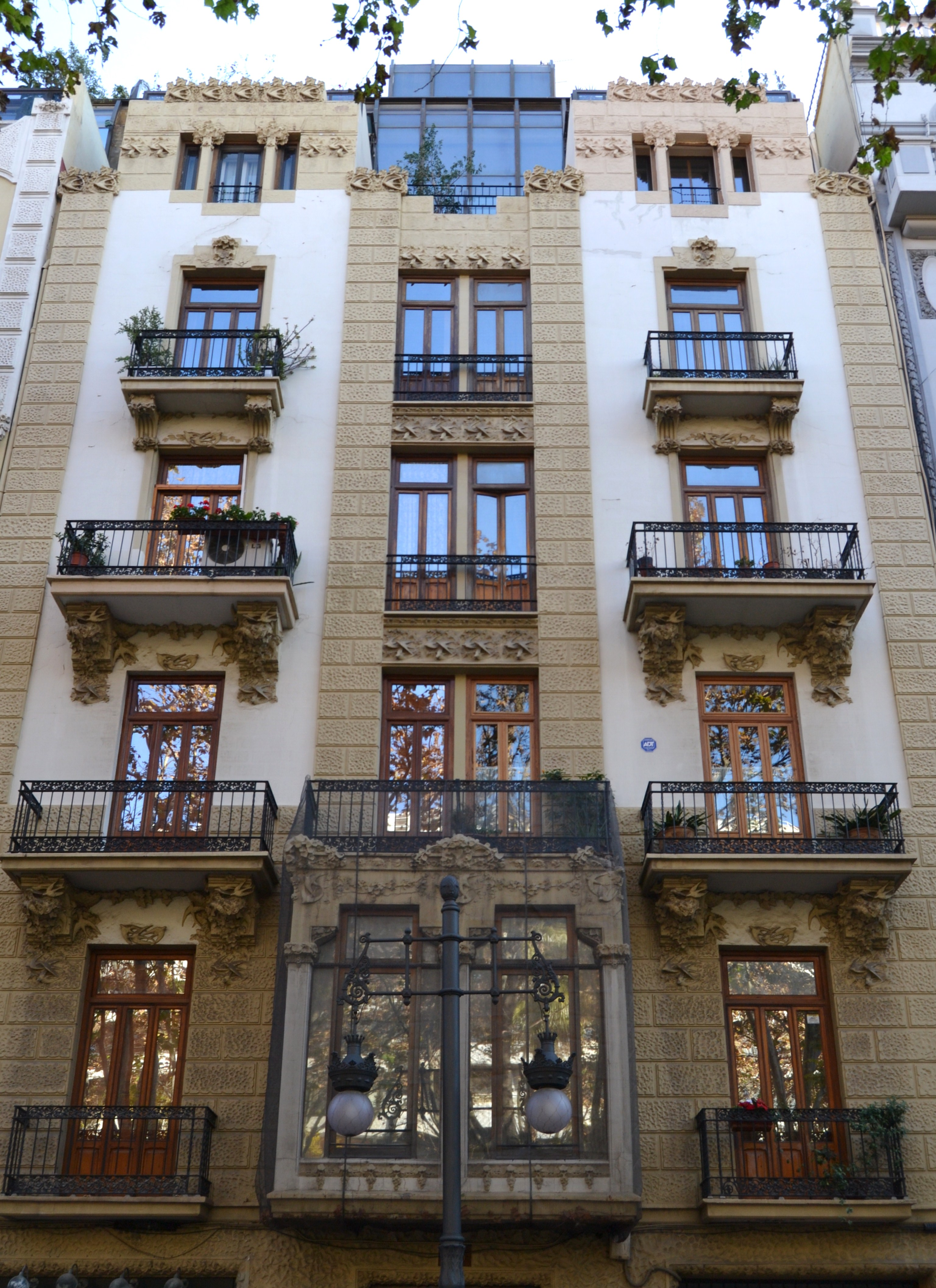 Casa de Matilde Pons o dels pardalets, València.